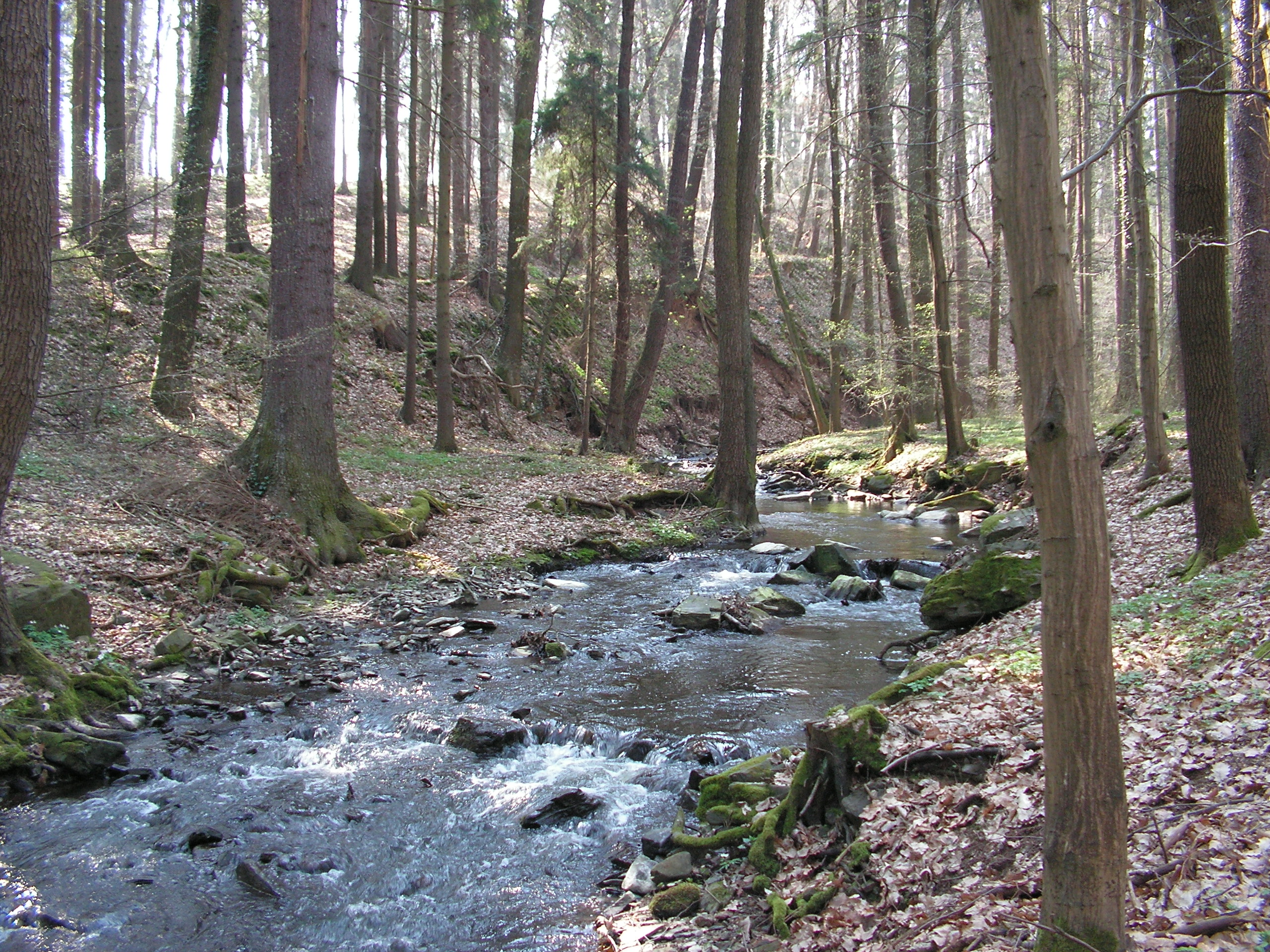 Paběnický potok pod Hraběšínem.